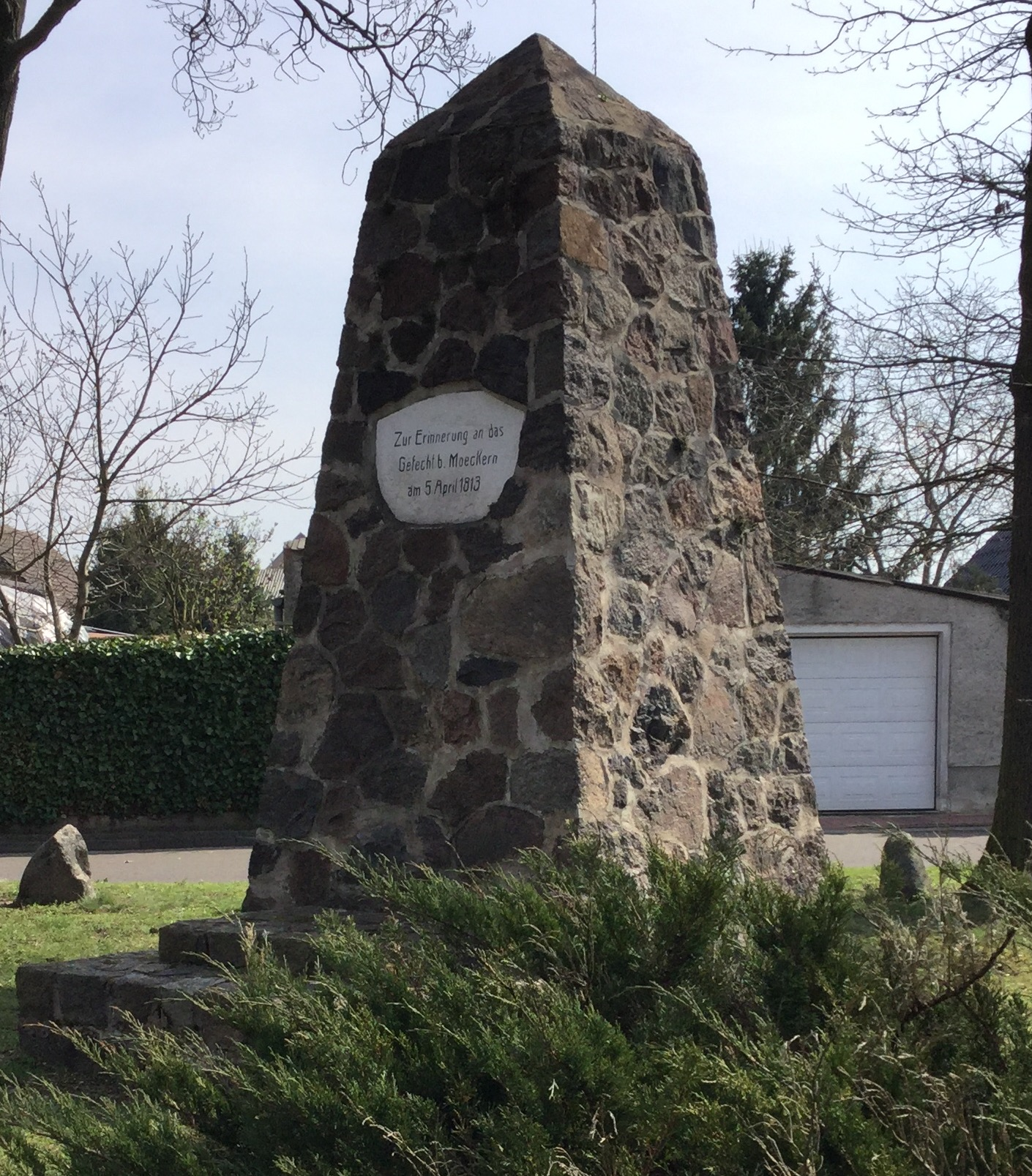 Denkmal in Möckern